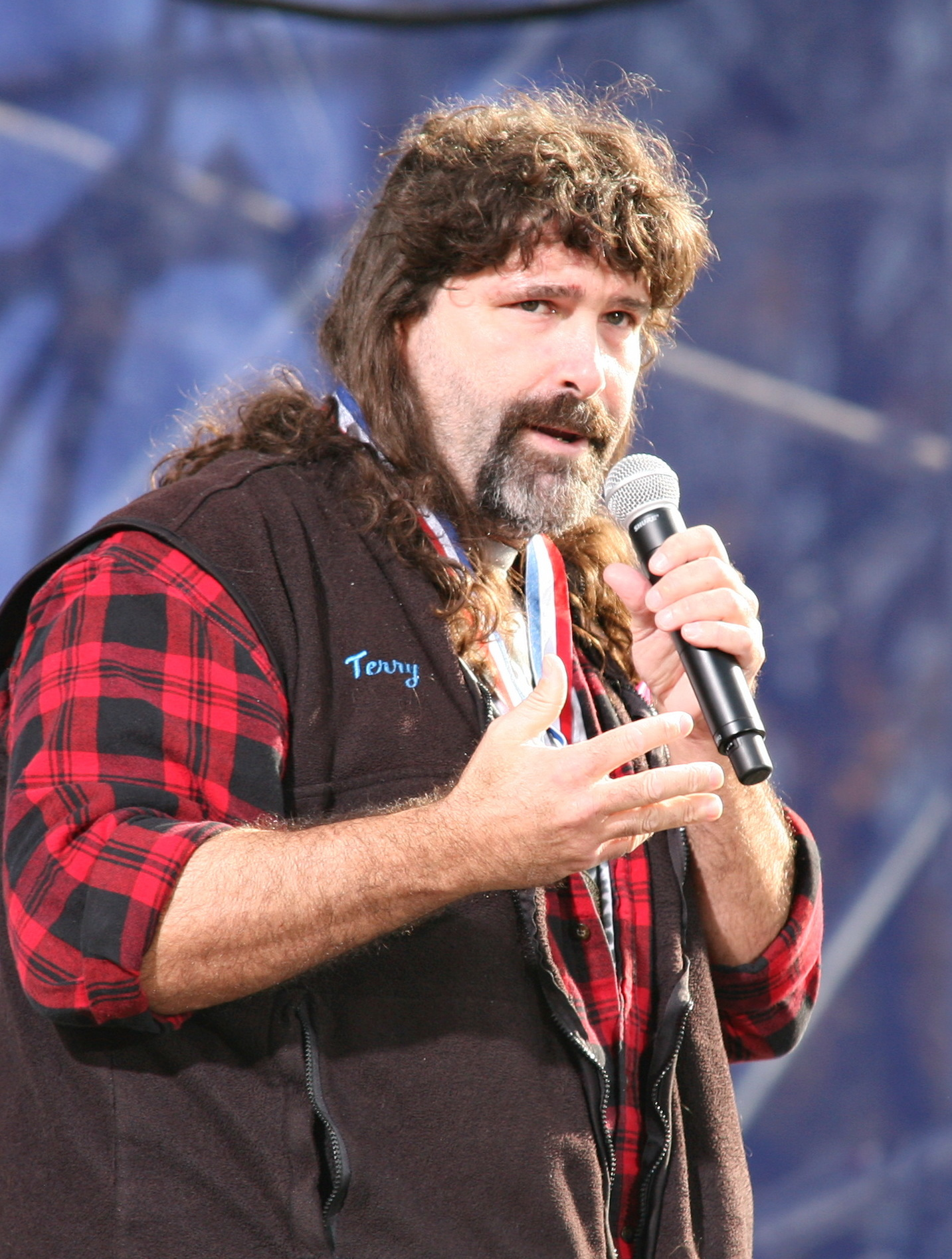 Mick Foley "Mankind". Cette photo a été prise le 30 octobre 2010 avec un Canon EOS 5D.